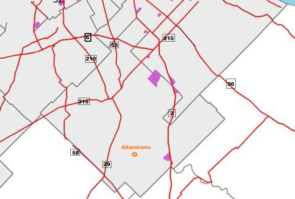 Altamirano